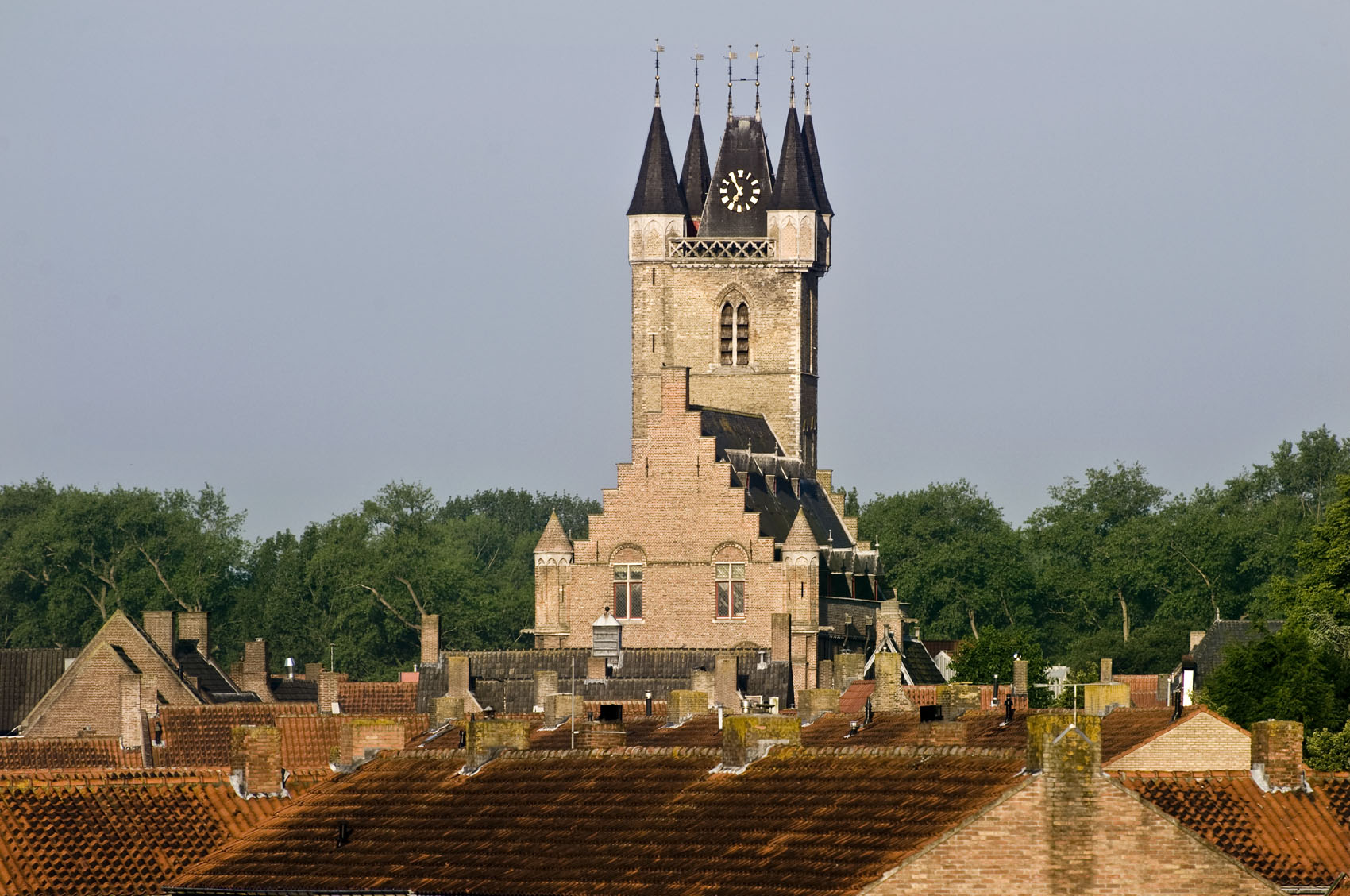 Het Belfort van Sluis in Zeeland.